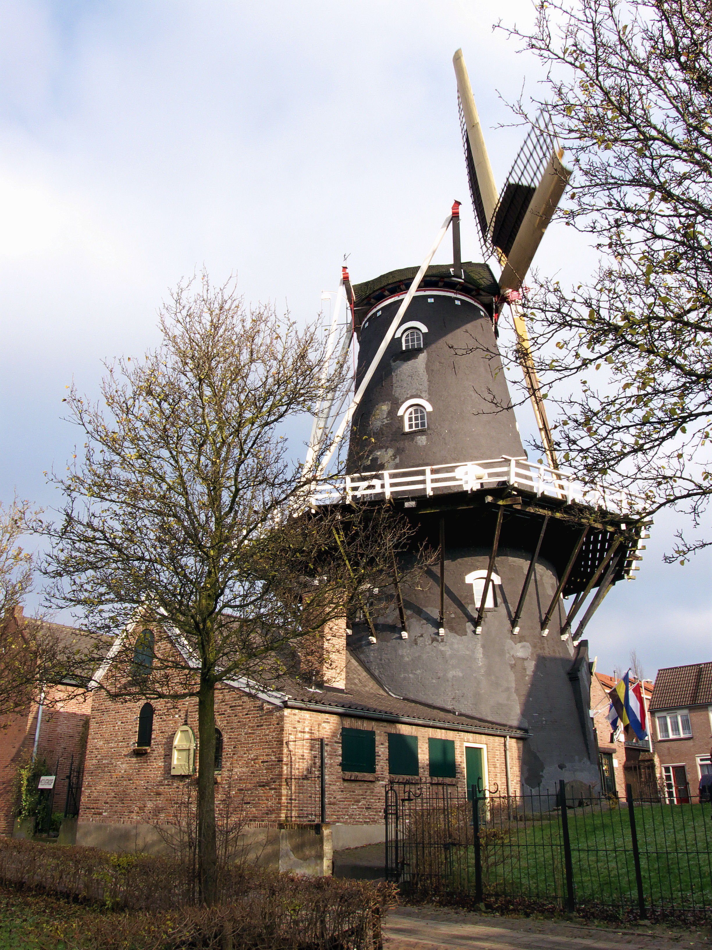 Molen De Kroon Arnhem met paardenstal